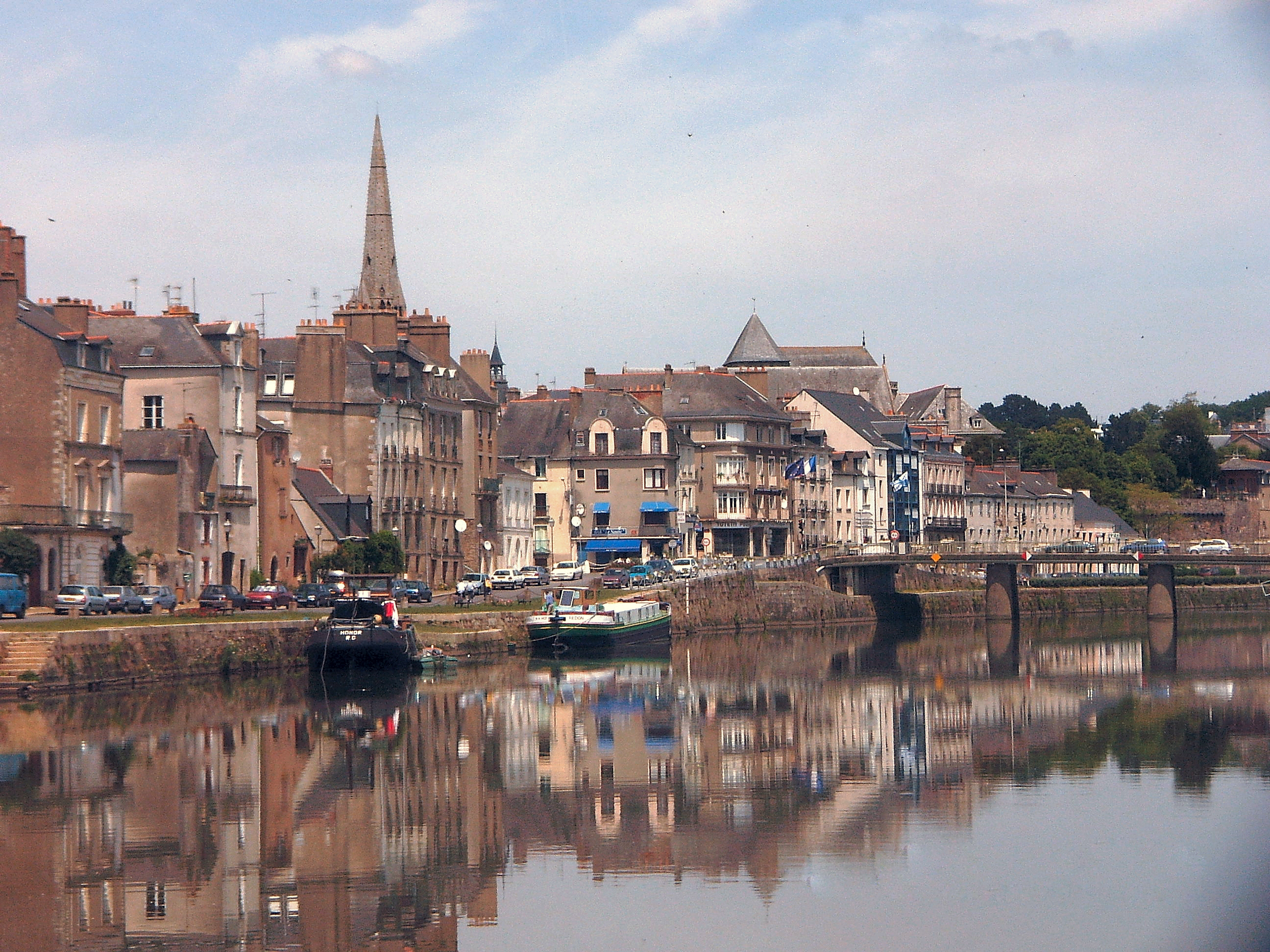 Die Stadt Redon am Ufer der Vilaine, Bretagne, Frankreich